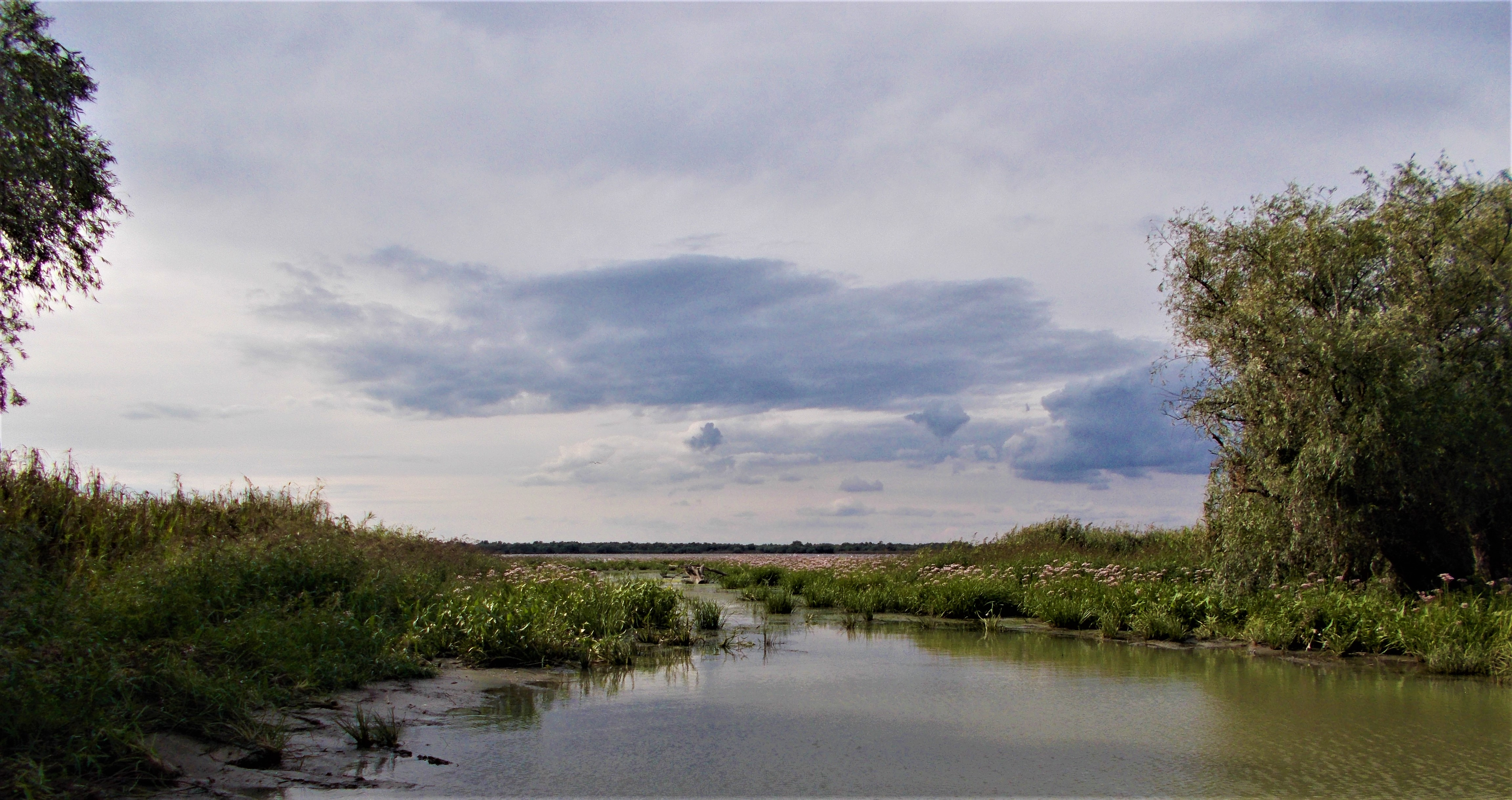 Lacul Nebunu (în fundal) văzut de pe canalul Șontea